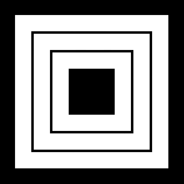 「三升」紋（染抜）